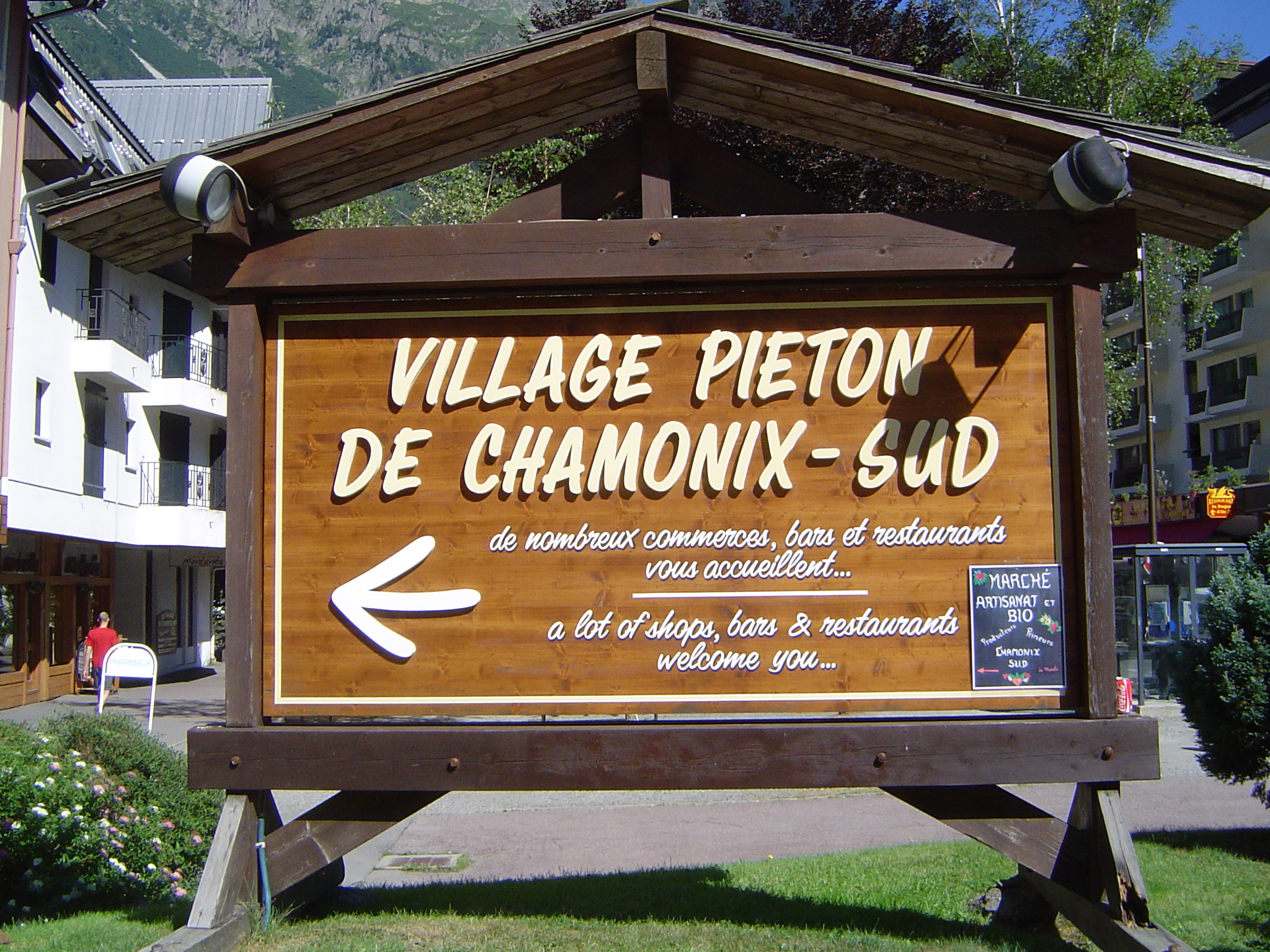 Photo prise à Chamonix-Mont-Blanc (France)